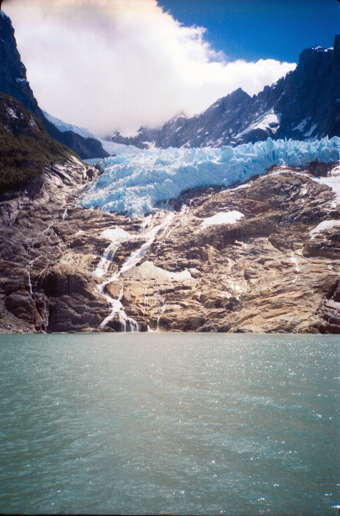 Yükleyenin çektiği foto